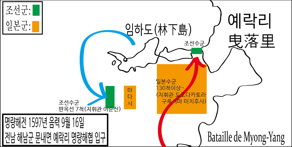 명량해전 전개과정을 간략히 나타낸 그림입니다.